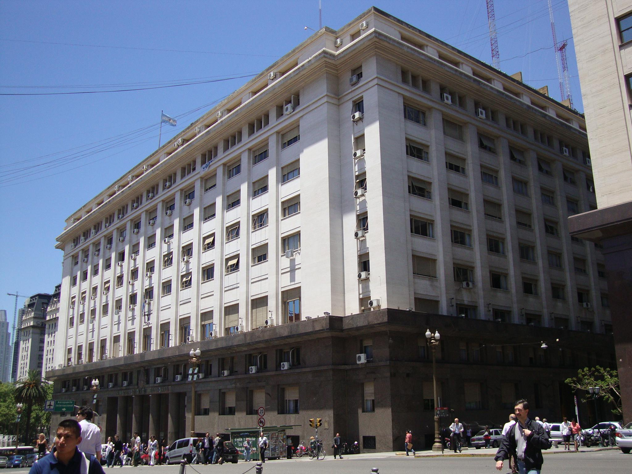 Palacio de Hacienda, edificio construido entre 1937 y 1950 para alojar al Ministerio de Hacienda, luego Ministerio de Economía. Buenos Aires, Argentina.